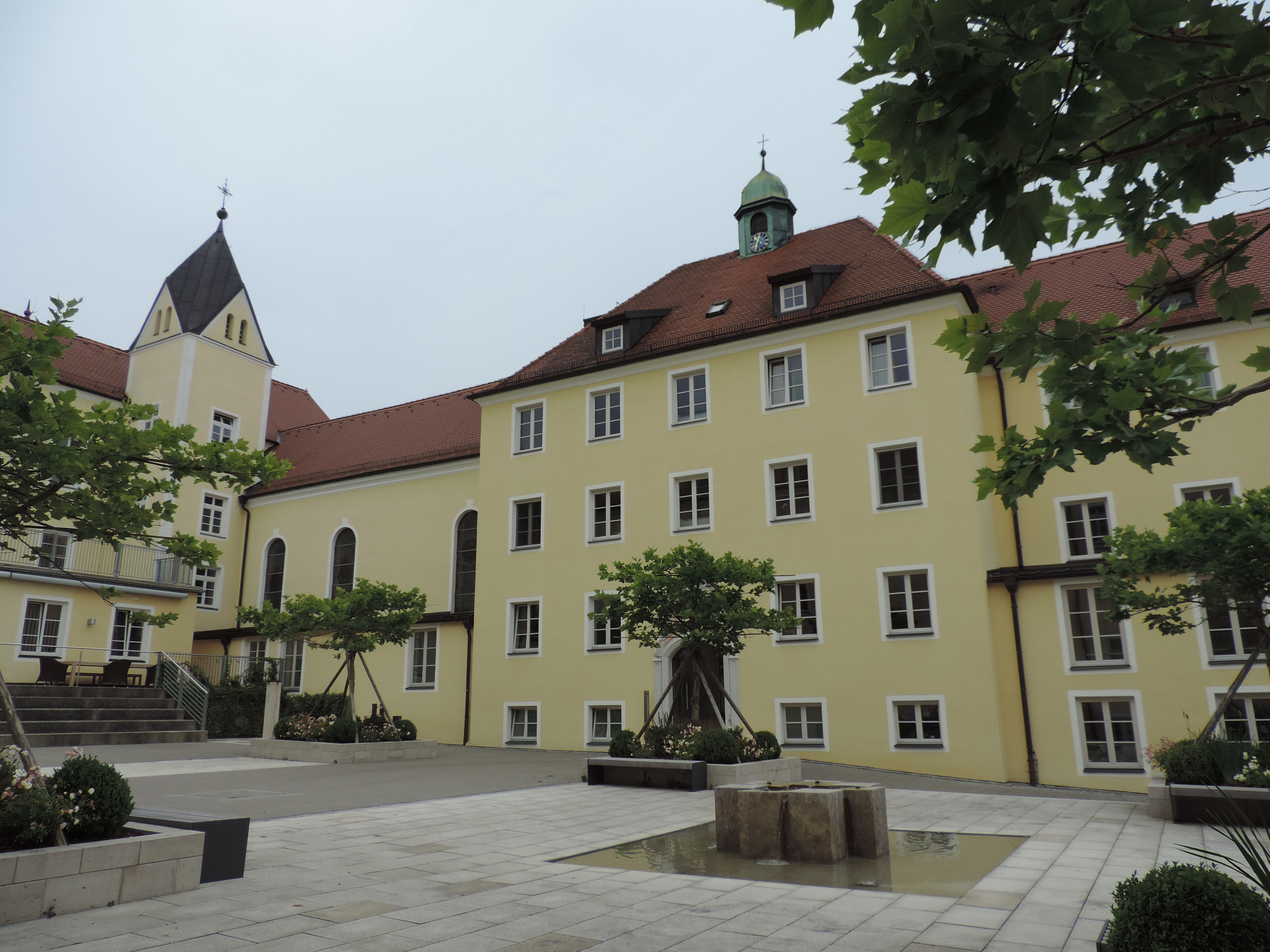 Innenhof Schloss Schweinspoint